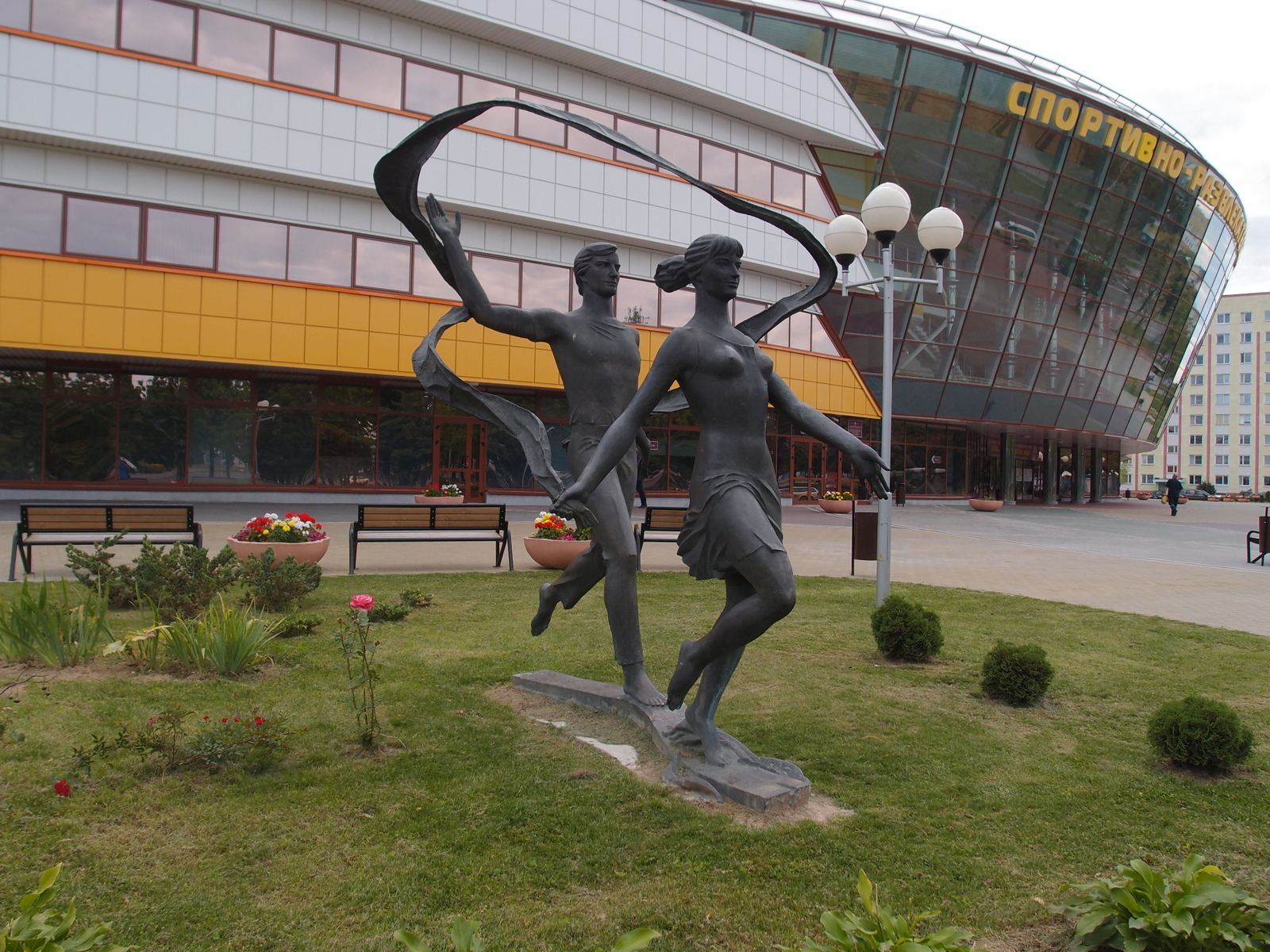 Беларуская (тарашкевіца): Sports Complex Maladziečna